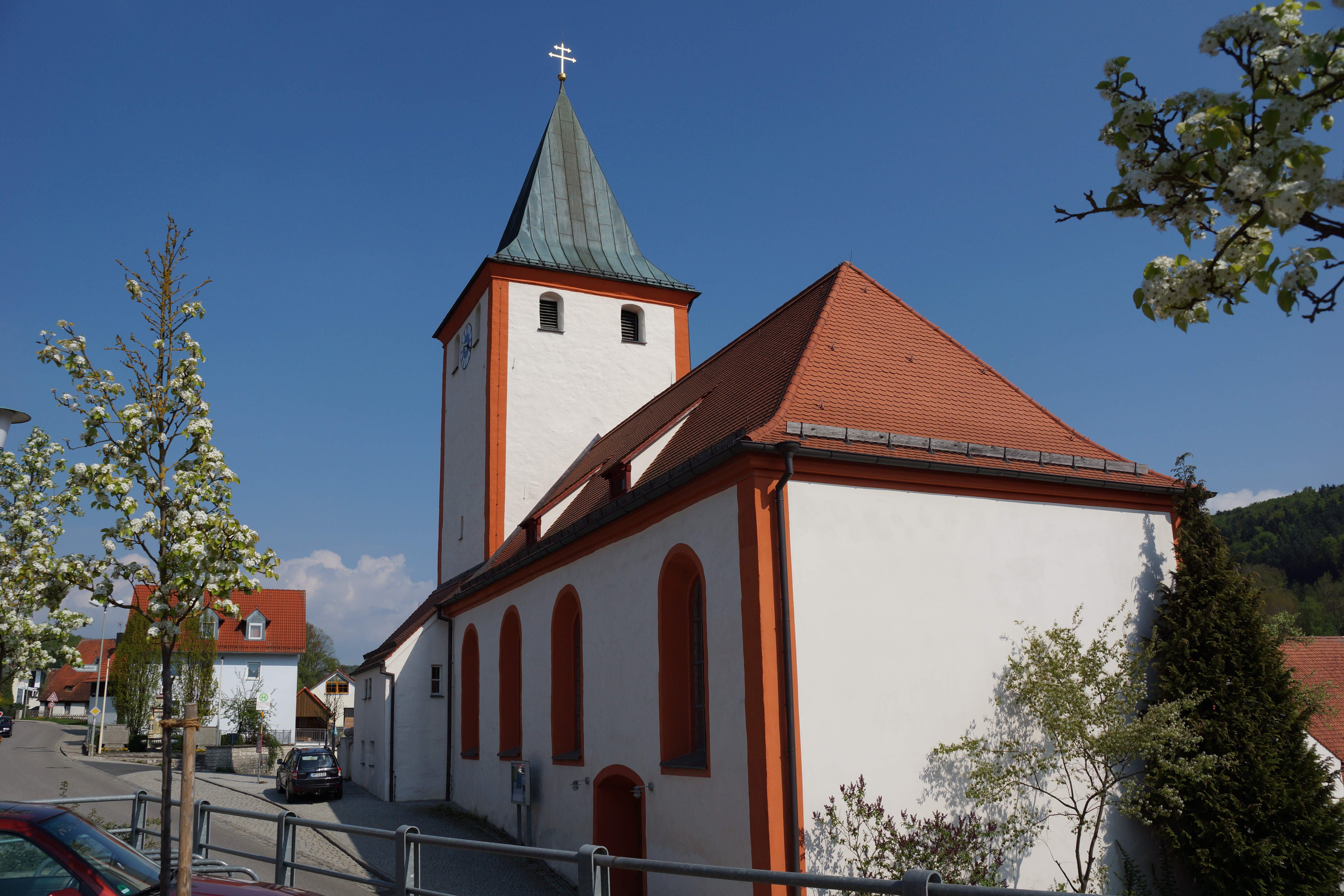 Die Kirche St. Jakobus in Sindlbach, Kreis Neumarkt Oberpfalz